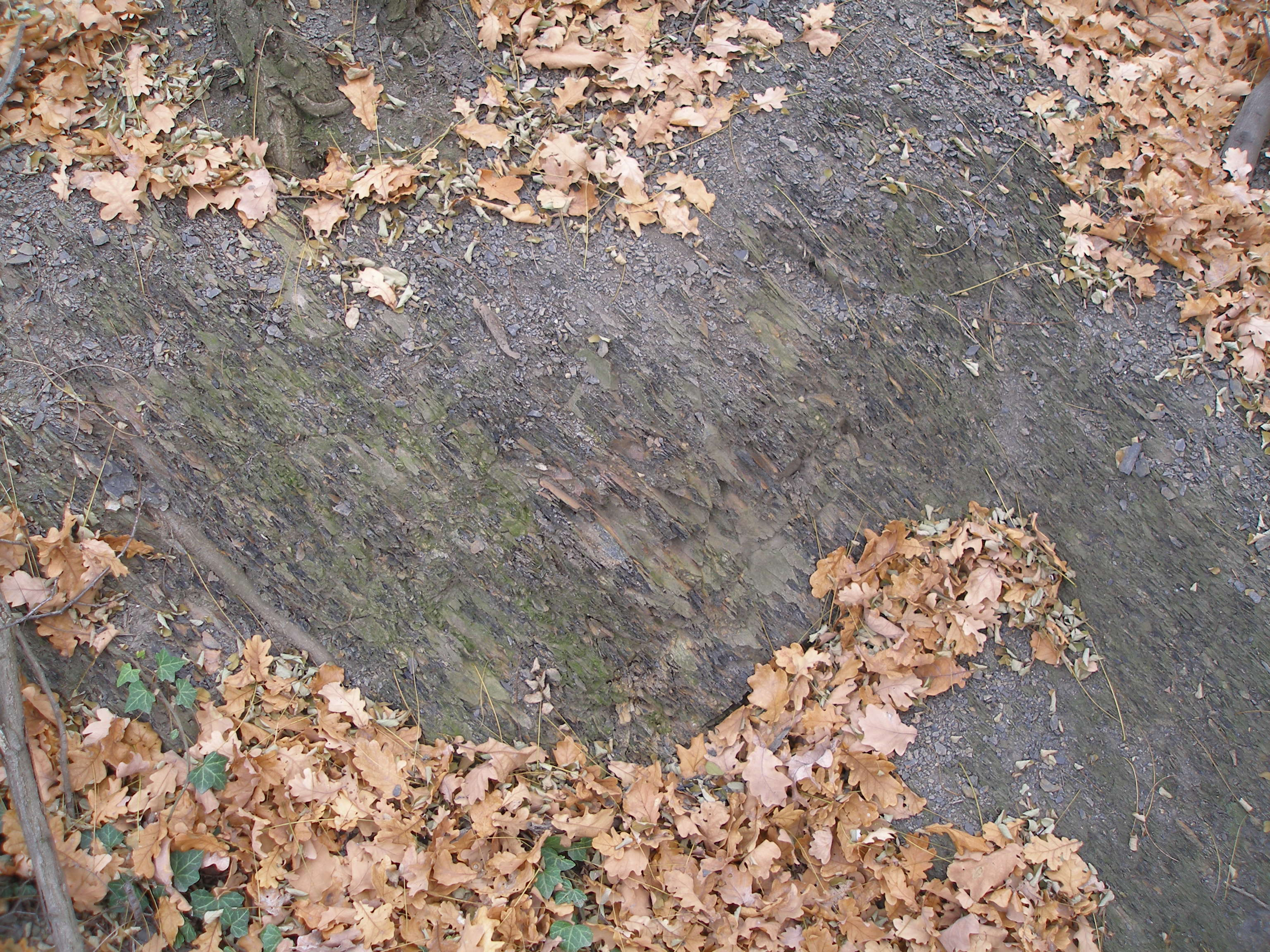 Břidlice na Bílé skále nad portálem tamního železničního tunela.